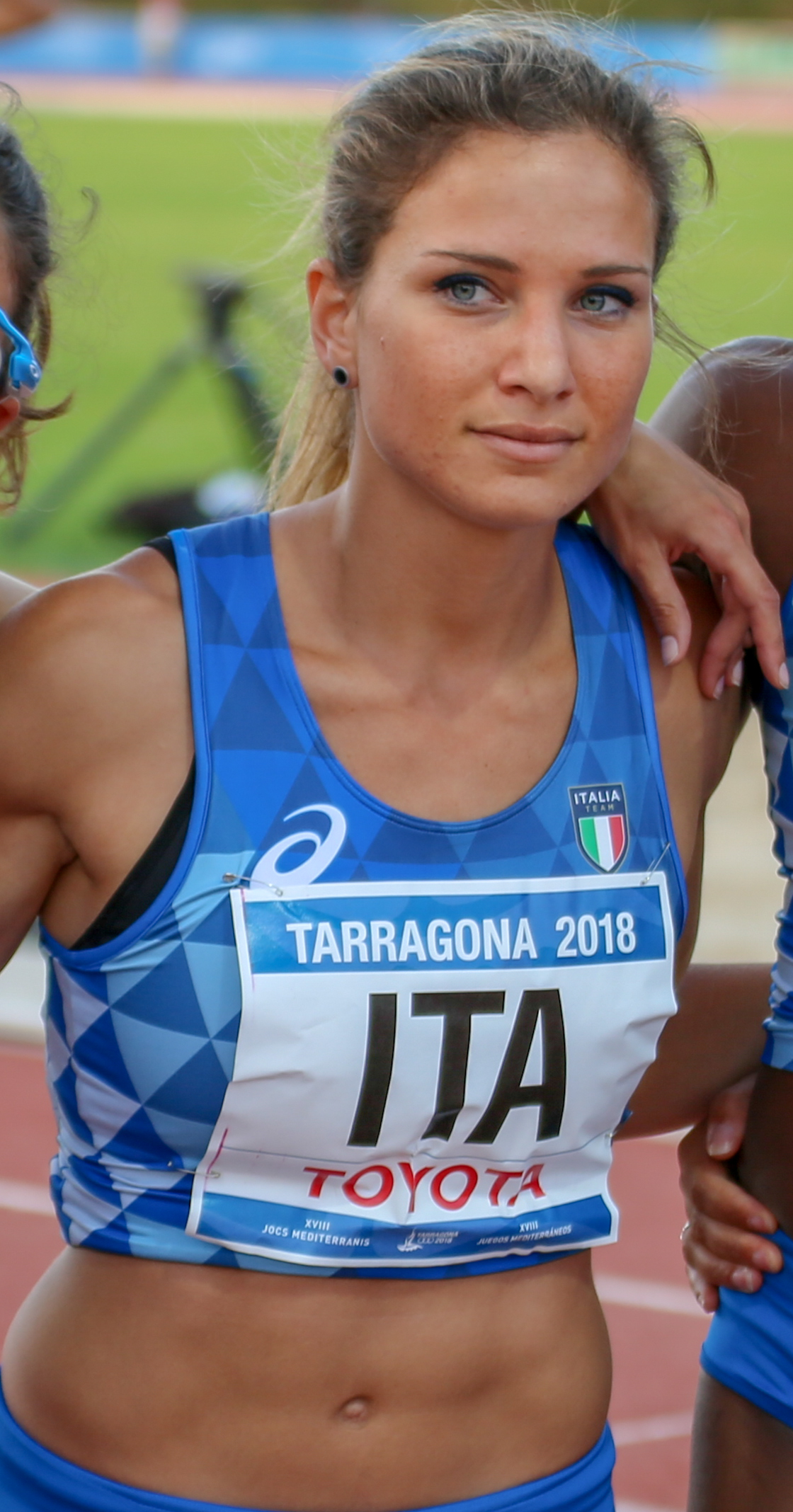 Anna Bongiorni en los relevos 4x100 en los Juegos del Mediterráneo 2018